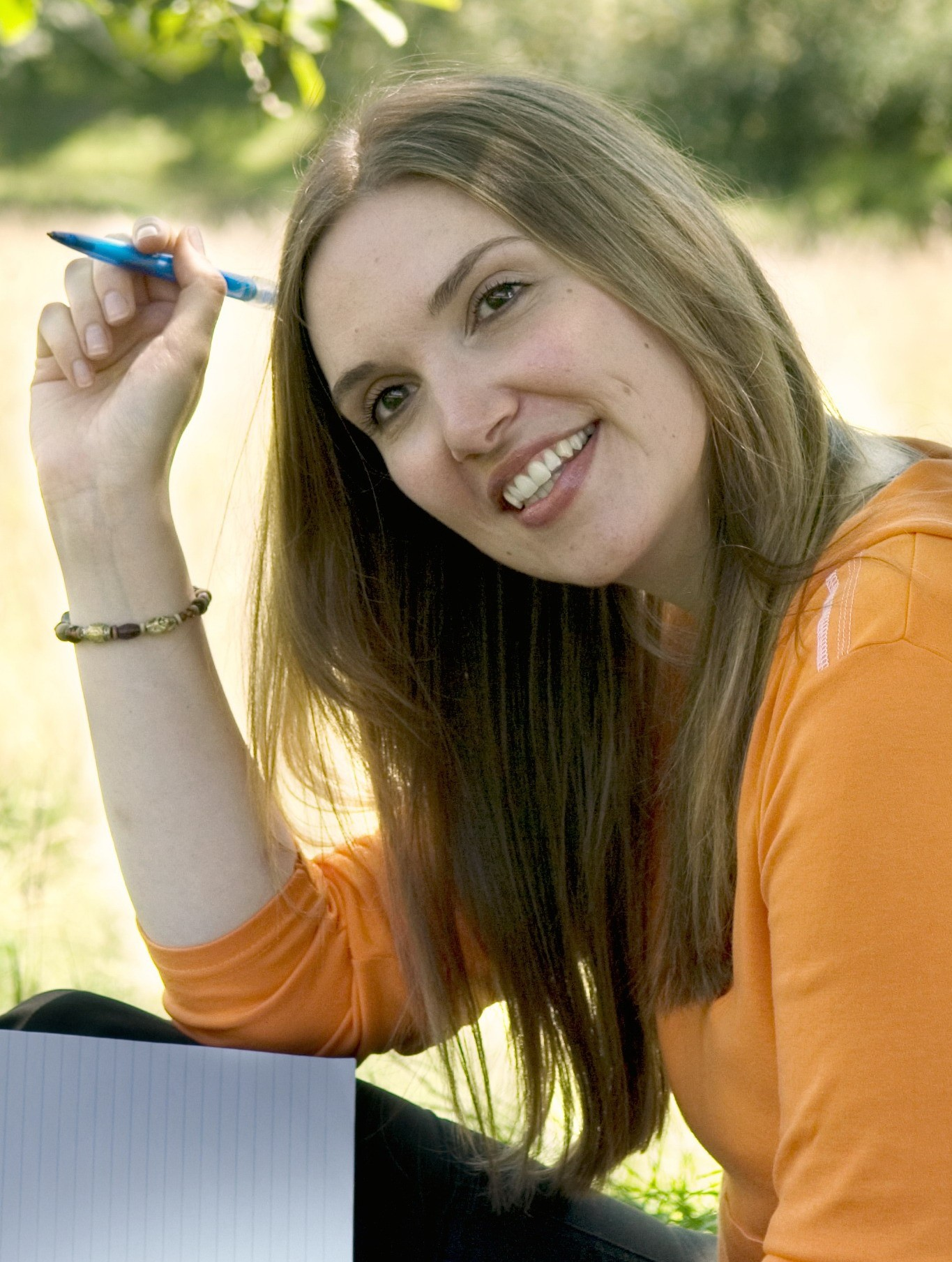 Porträt von Tanya Stewner